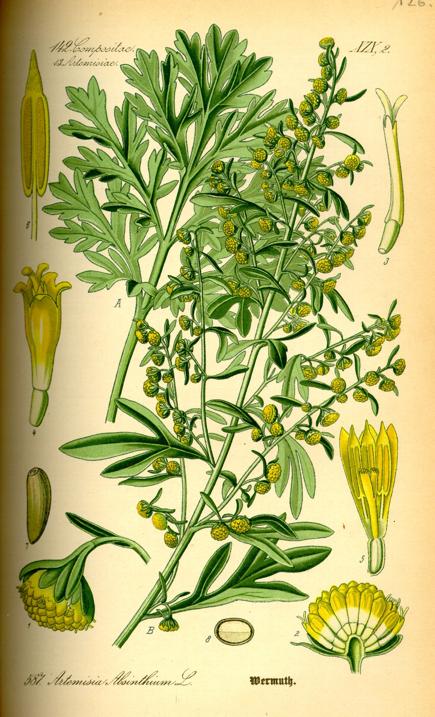 Artemisia absinthium from Flora von Deutschland Österreich und der Schweiz, Gera 1885